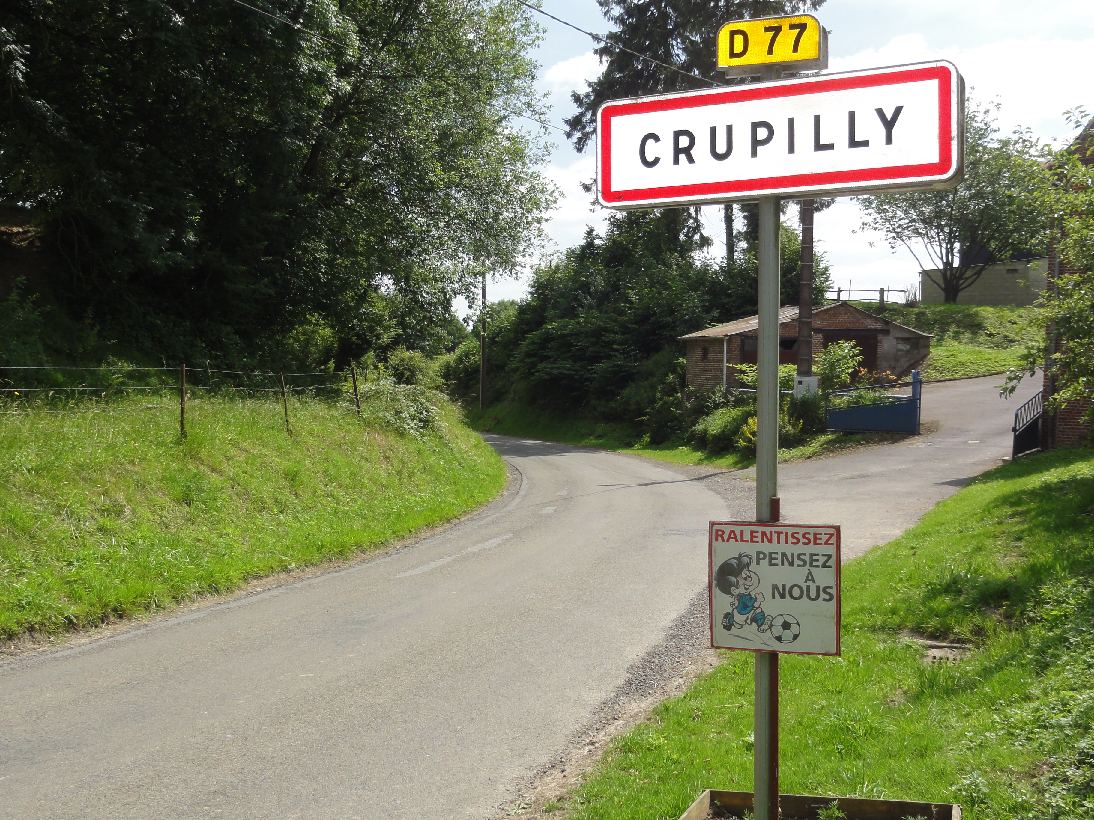 Crupilly (Aisne) city limit sign